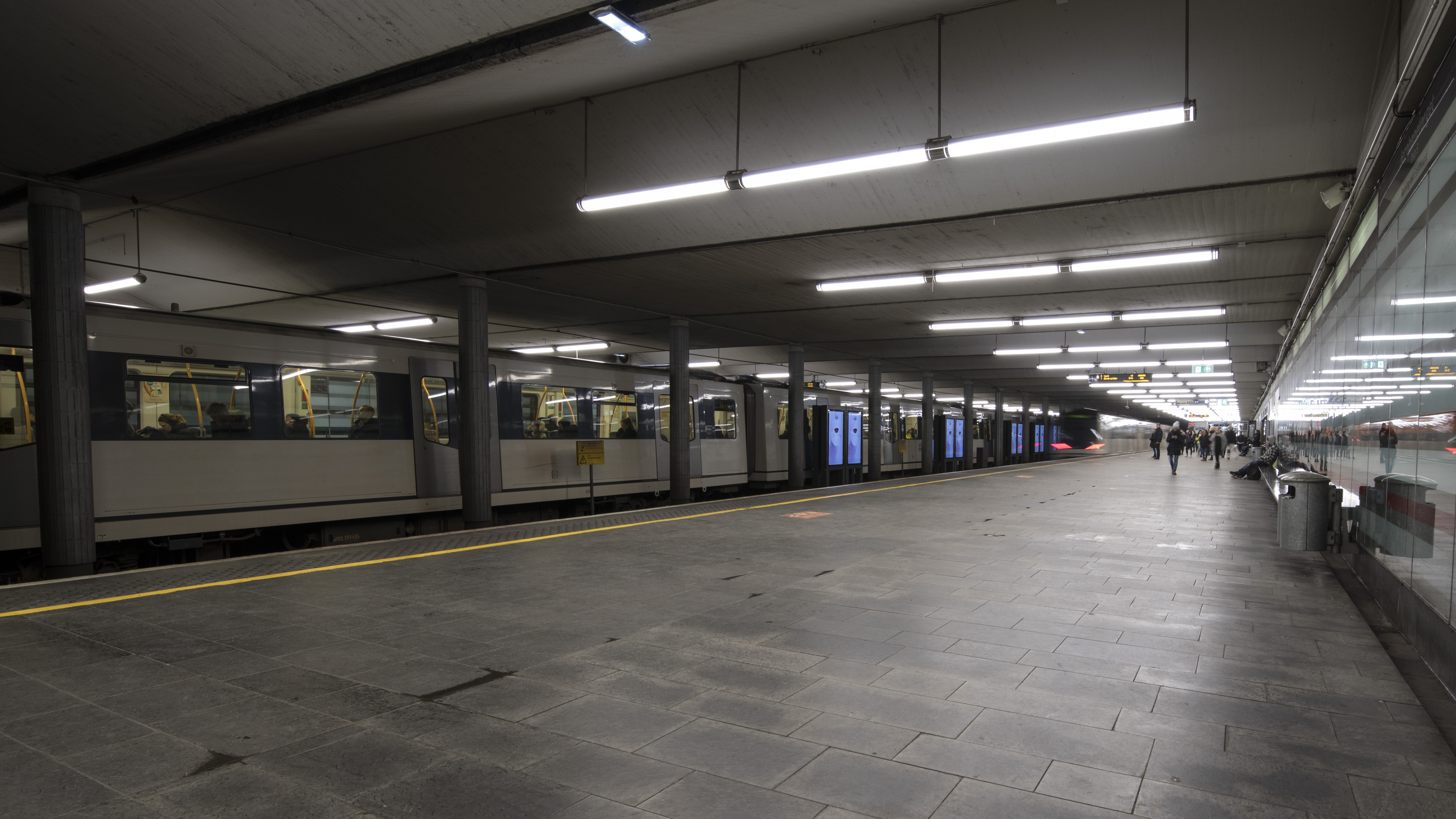 Østgående spor på Jernbanetorget stasjon